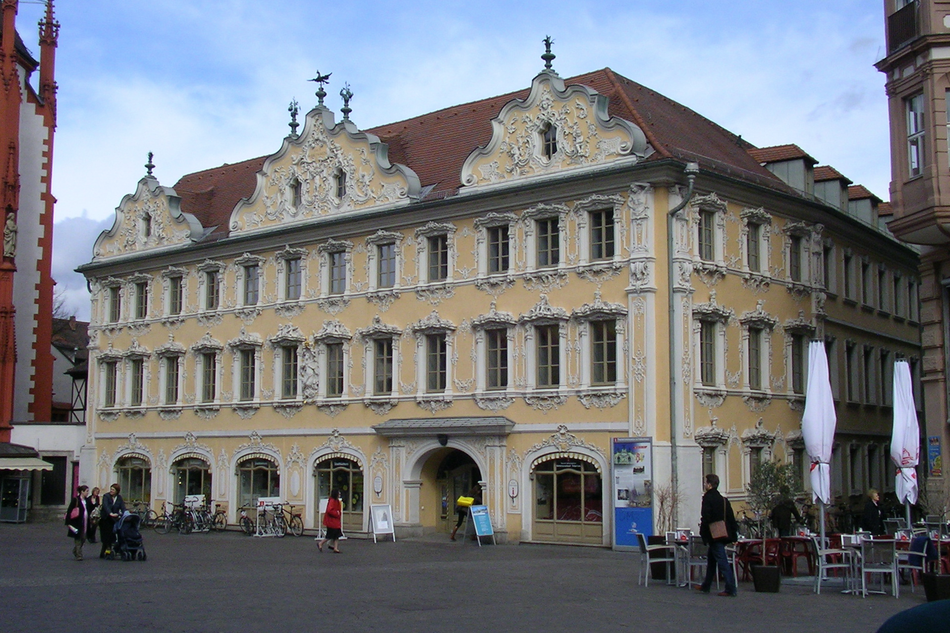 Das Falkenhaus am Marktplatz in Würzburg